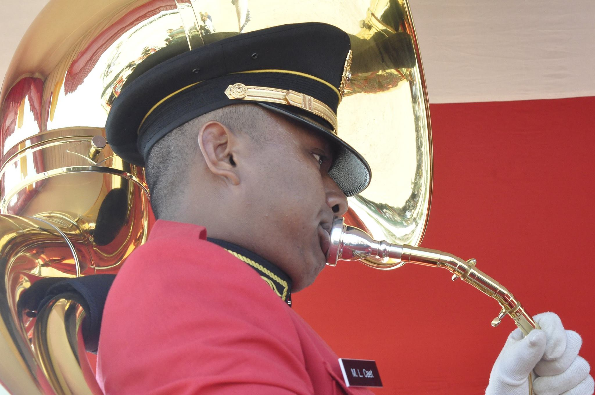 Tetun: Serimónia Komemorasaun Loron Proklamasaun Indpendénte